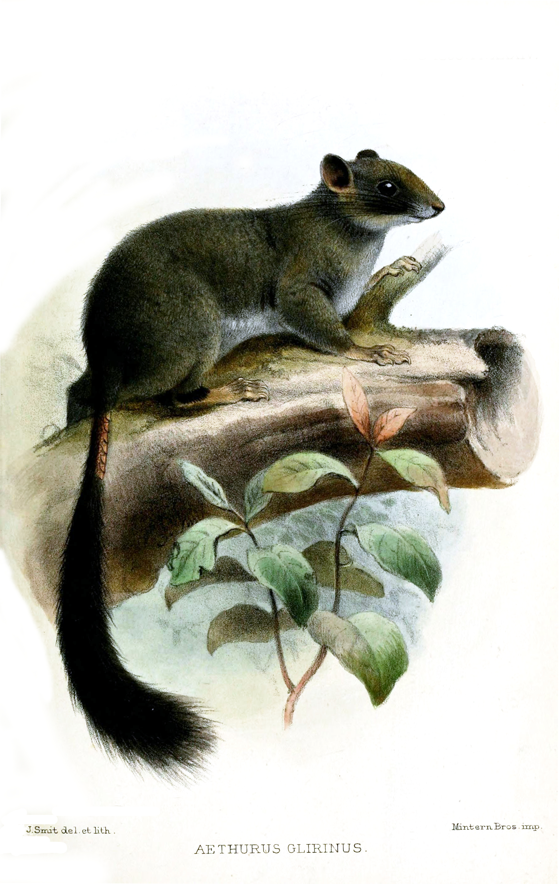 Aethurus glirinus = Zenkerella insignis